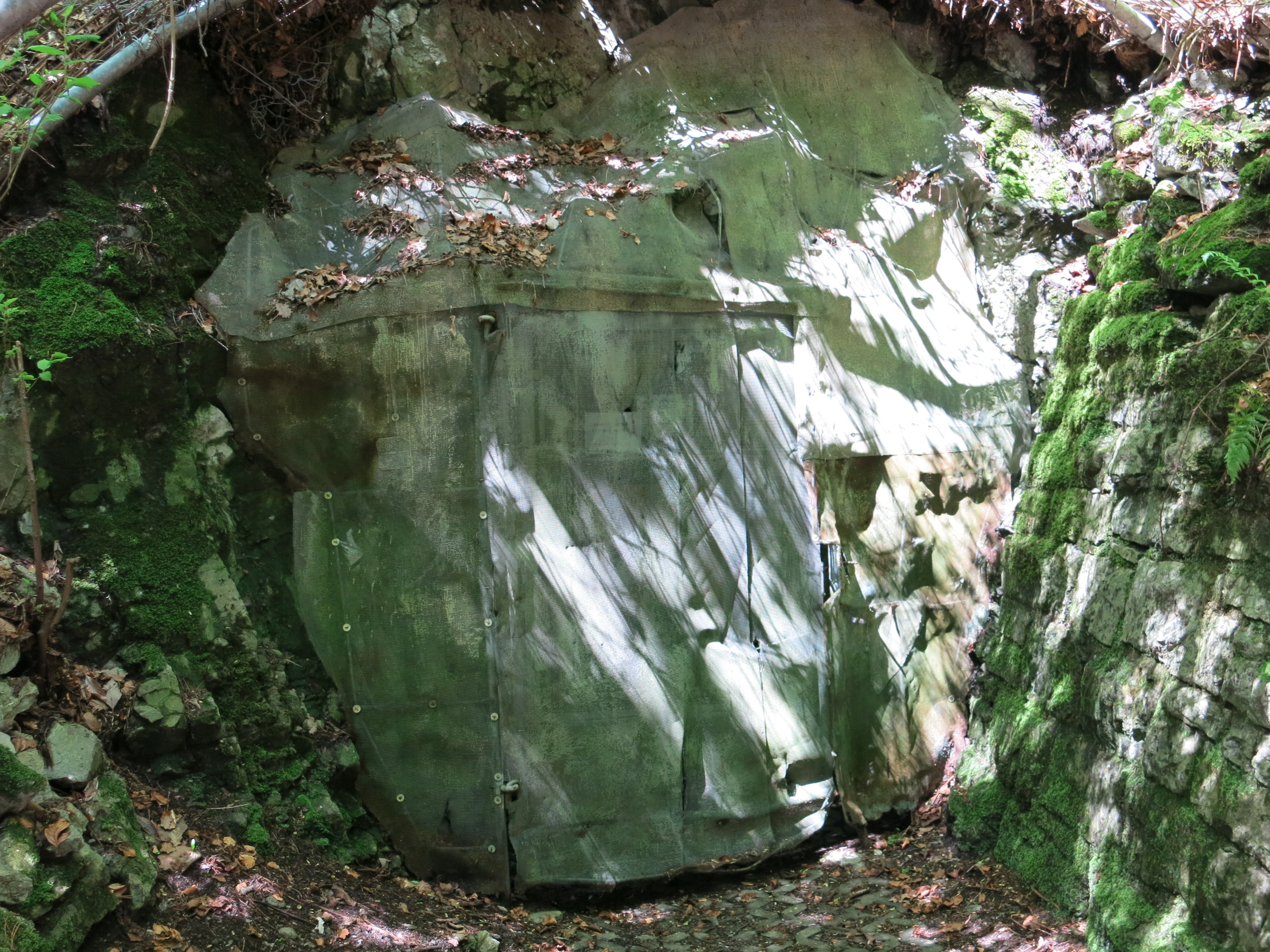 KP Heinrich, Spiez BE, Schweiz